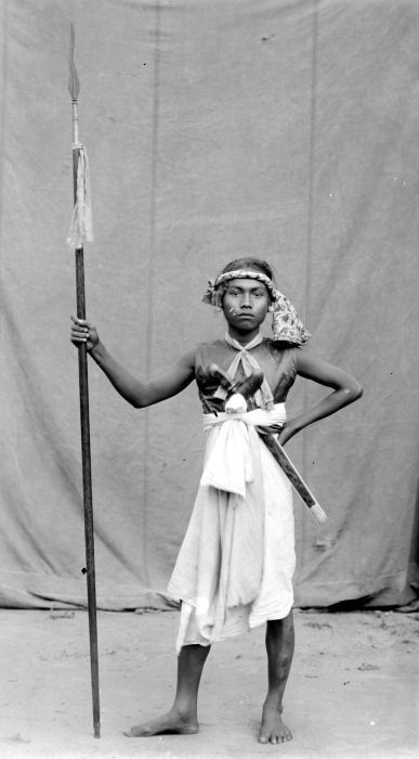 Negatief. Portret van een Balinese tempeldanser met lans en kris